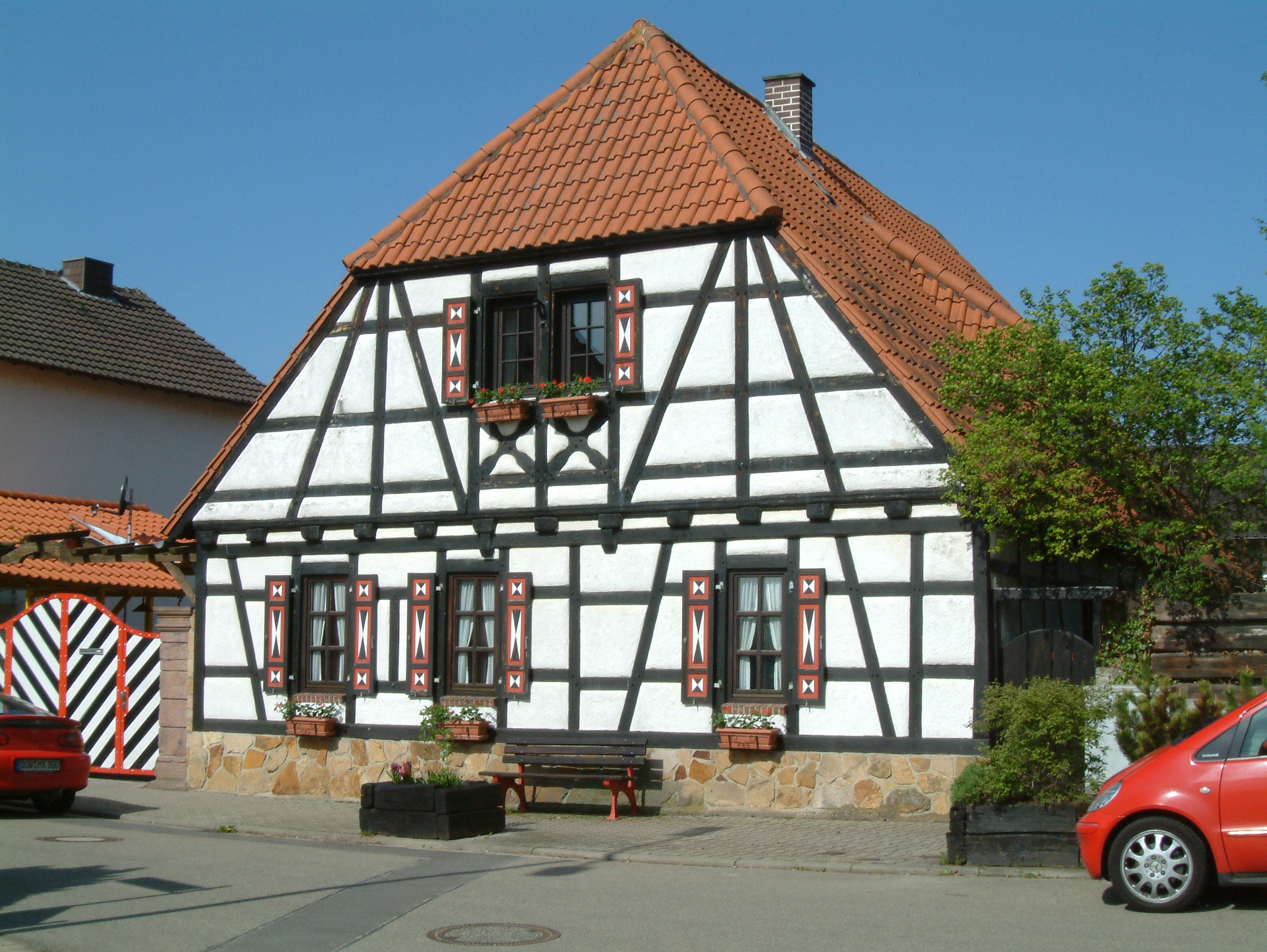 Das ehemalige Zollhaus zu Dirmstein, Aufnahme vom 28.04.2006 durch Benutzer:Mundartpoet